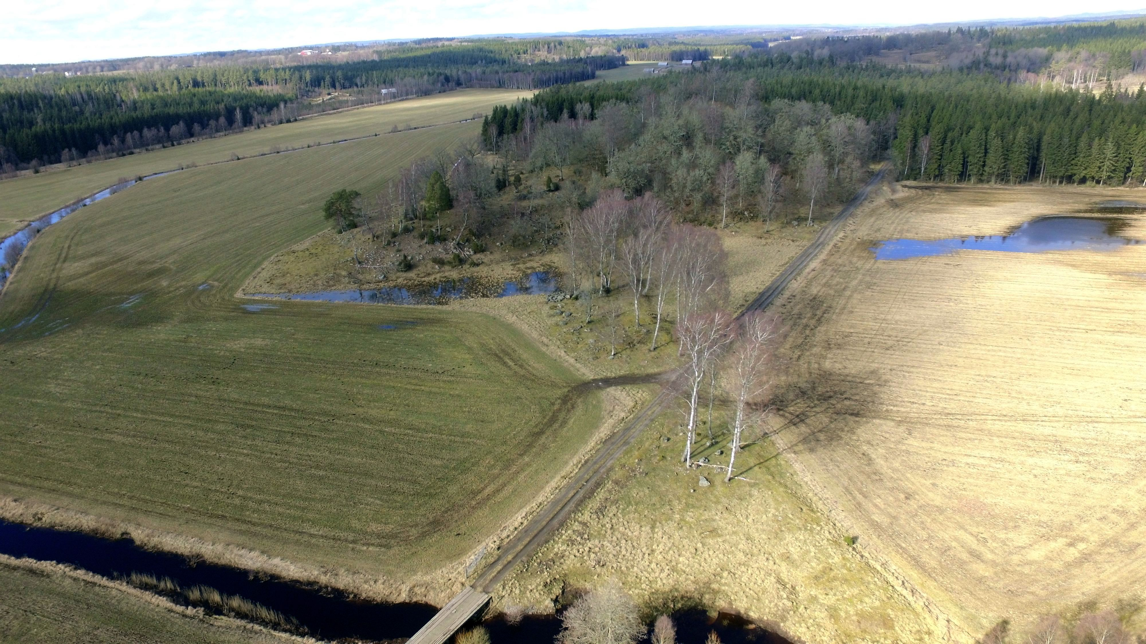 En medeltida vägbank genom det sanka landskapet har blivit en nutida björkallé in mot ruinerna av borgen Opensten, strax norr om Limmared.